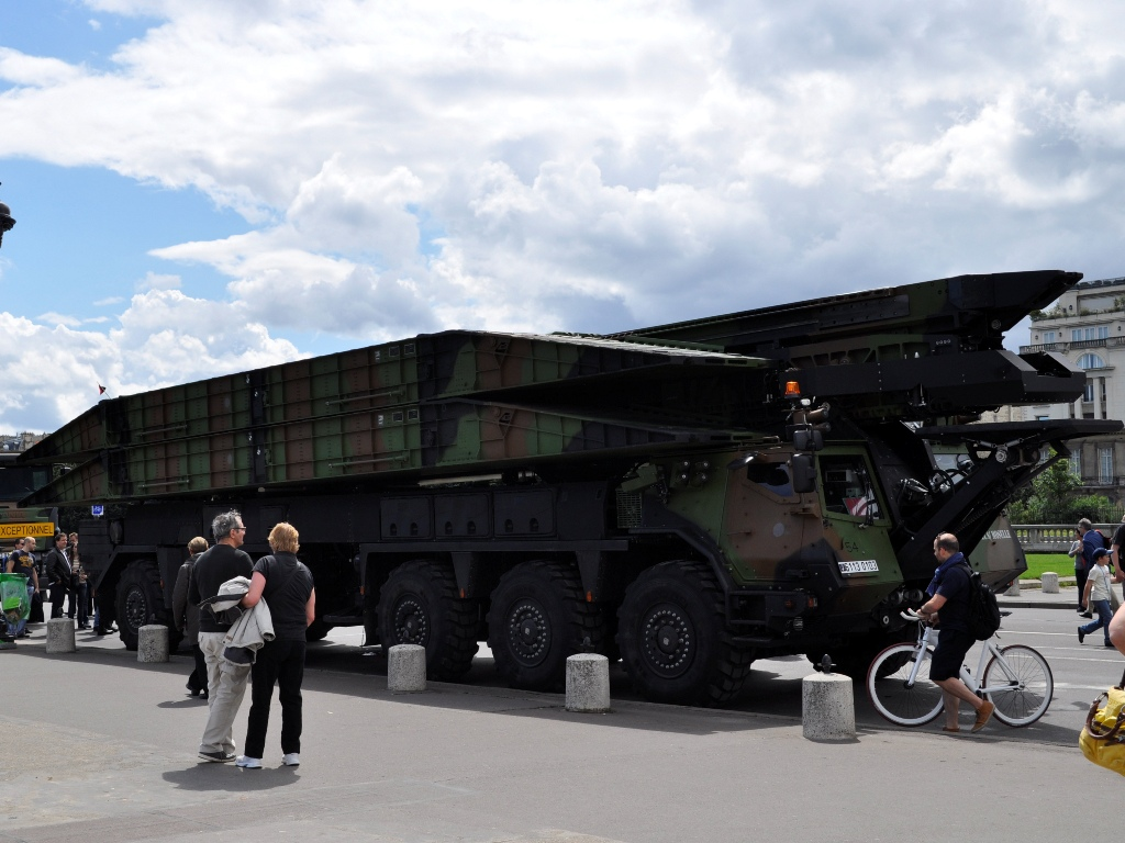 Système de pose rapide de travures du 13e régiment du génie de Valdahon (Doubs) de l'armée de terre française. Exposé à l'esplanade des Invalides à Paris, le 14 juillet 2012.